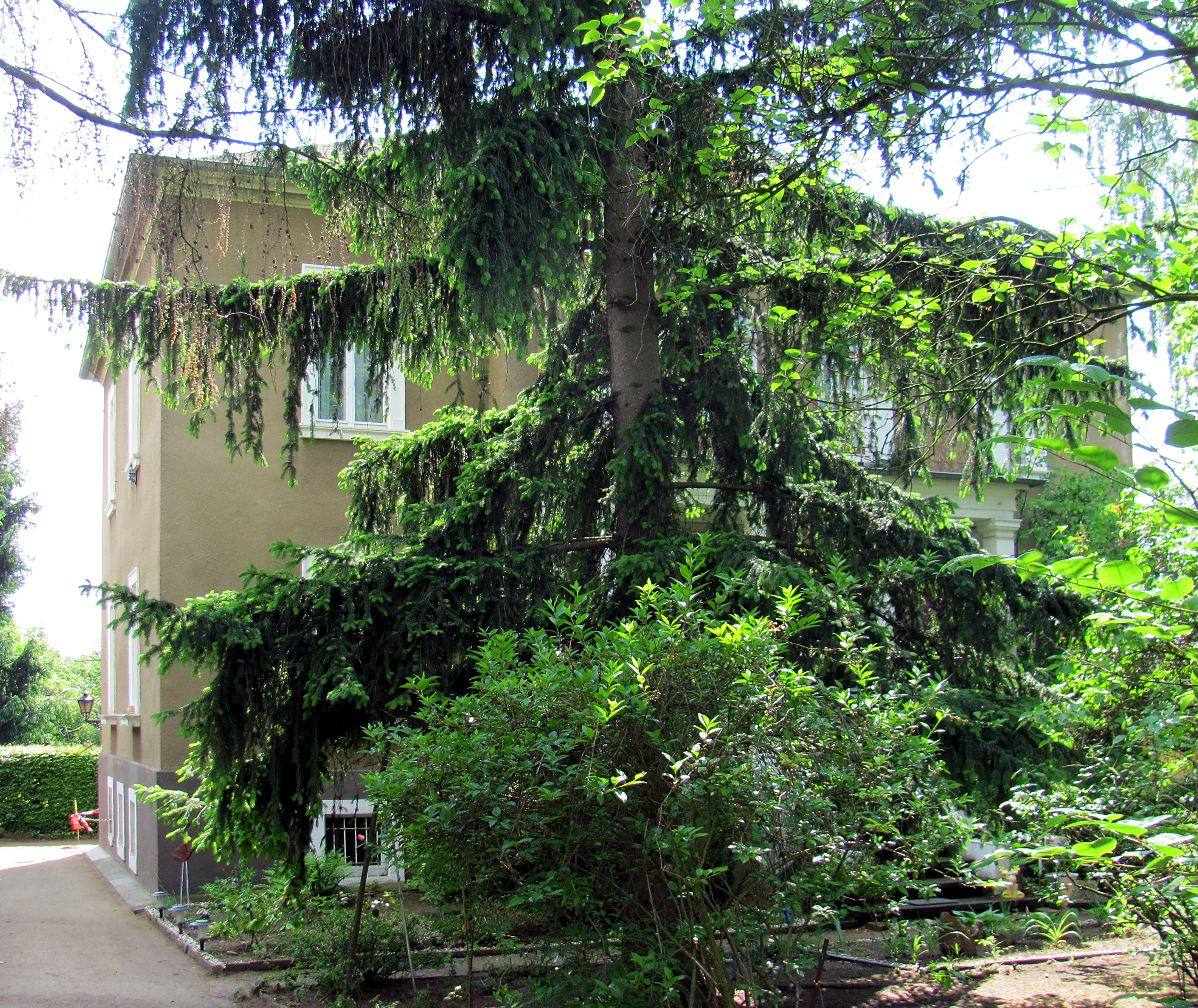 Radebeul-Kötzschenbroda, Villa Carl Gottfried Bär